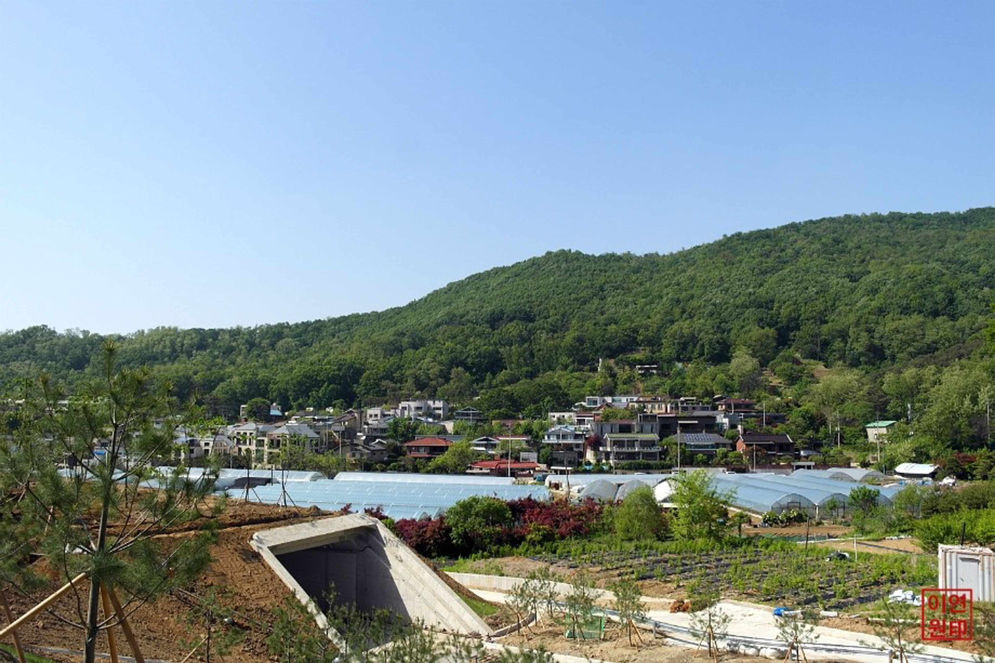 염곡동 전경